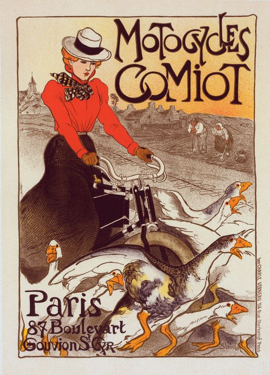 Affiche pour les "Motocycles Comiot, Paris, 87 Boulevart, Gouvion St Cyr" (Boulevard Gouvion-Saint-Cyr, Paris).